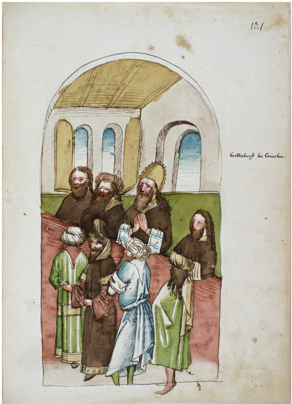 Rosgartenmuseum Konstanz, Hs. 1, Richental: Konzilschronik. In: Feger, Otto (Bearb.): Ulrich Richental: Das Konzil zu Konstanz. Faksimile. Starnberg - Konstanz 1964. Fol. 121r